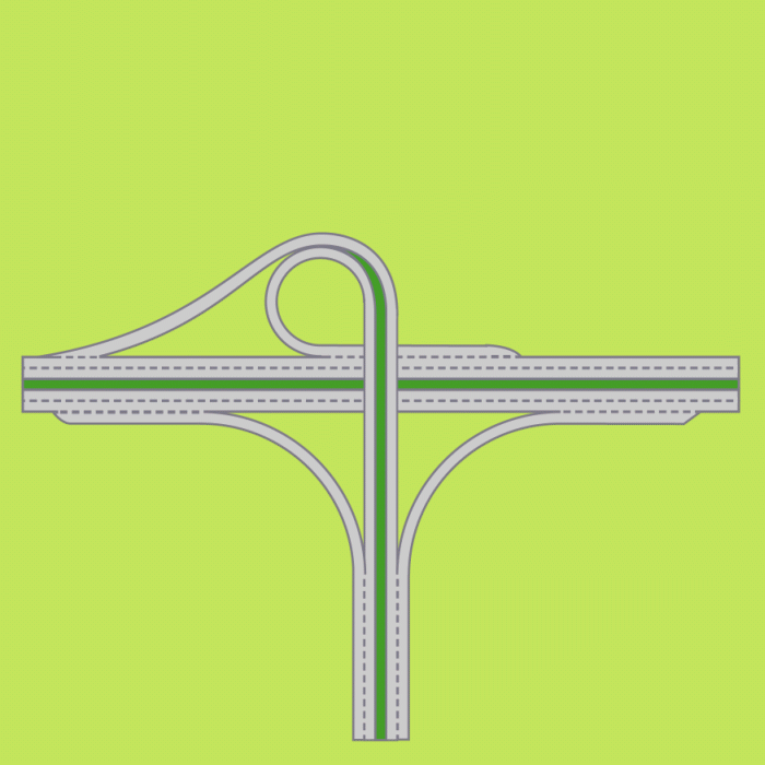 インターチェンジ（トランペット型）の説明図。